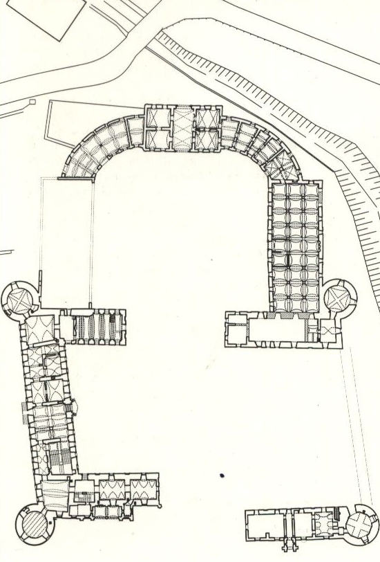 Banffy Castle in Bonţida, Cluj County, Romania